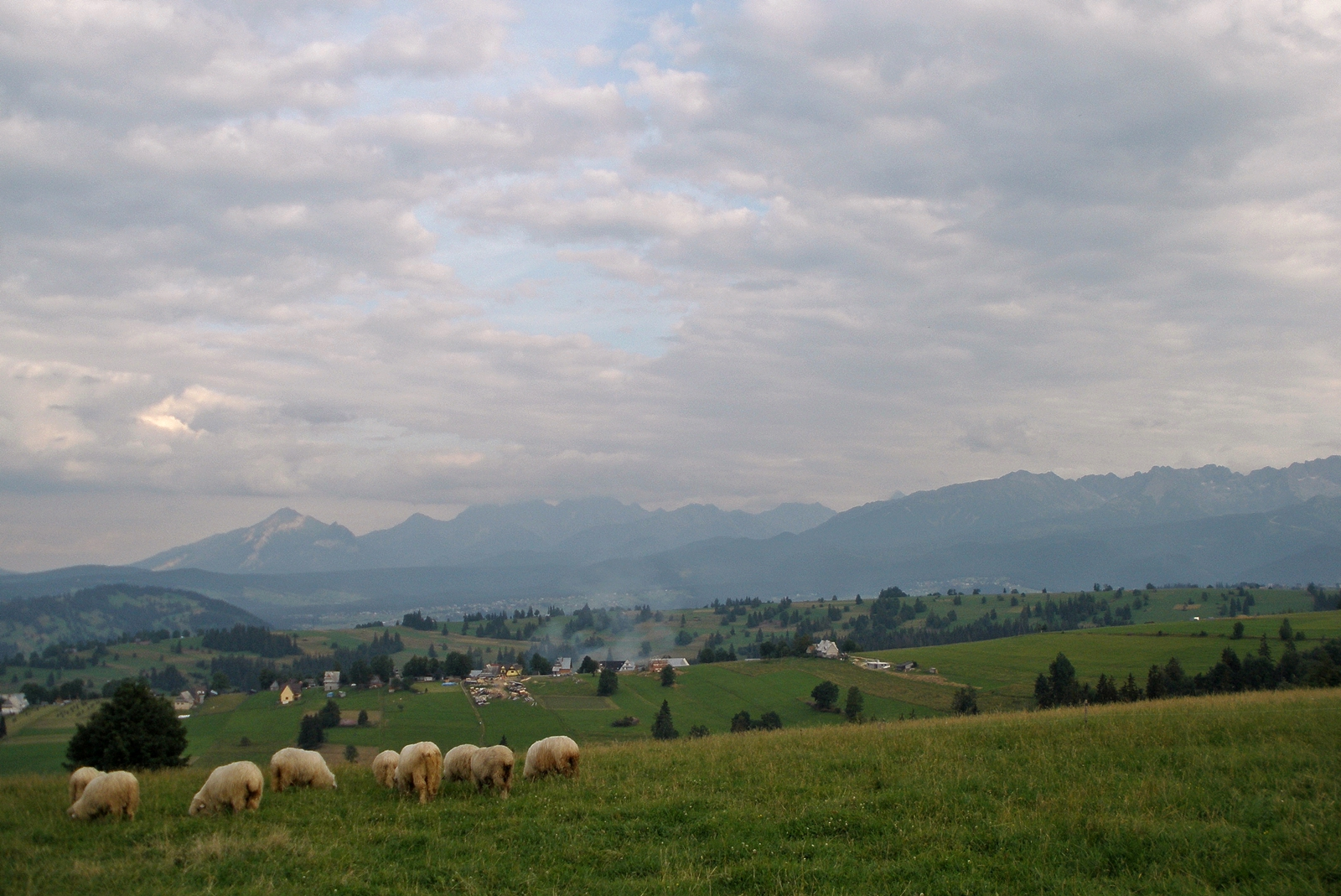 Owce w Sierockiem